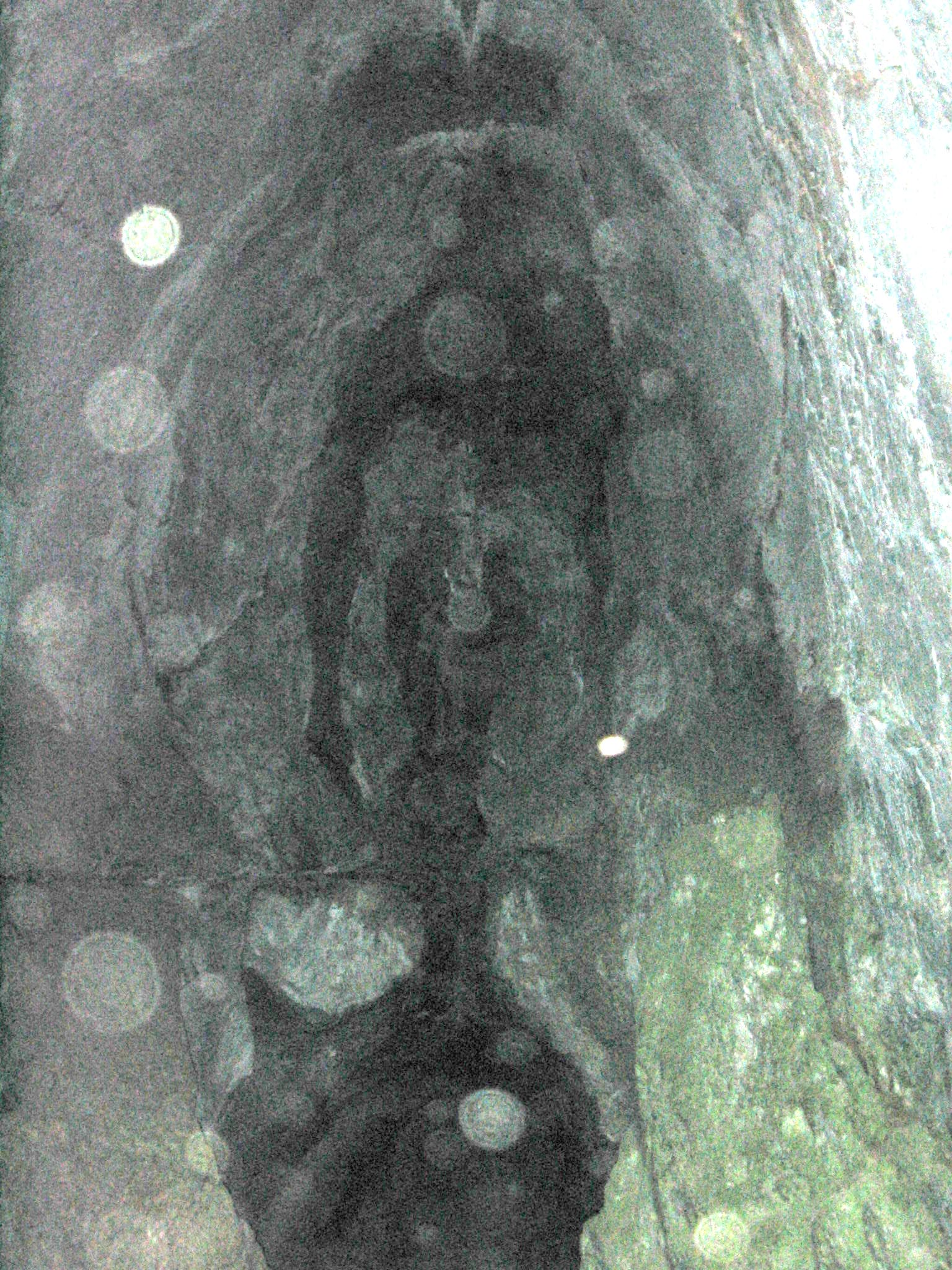 Formación rocosa en la cueva de Mari. (Duranguesado)Vizcaya, País Vasco, España.